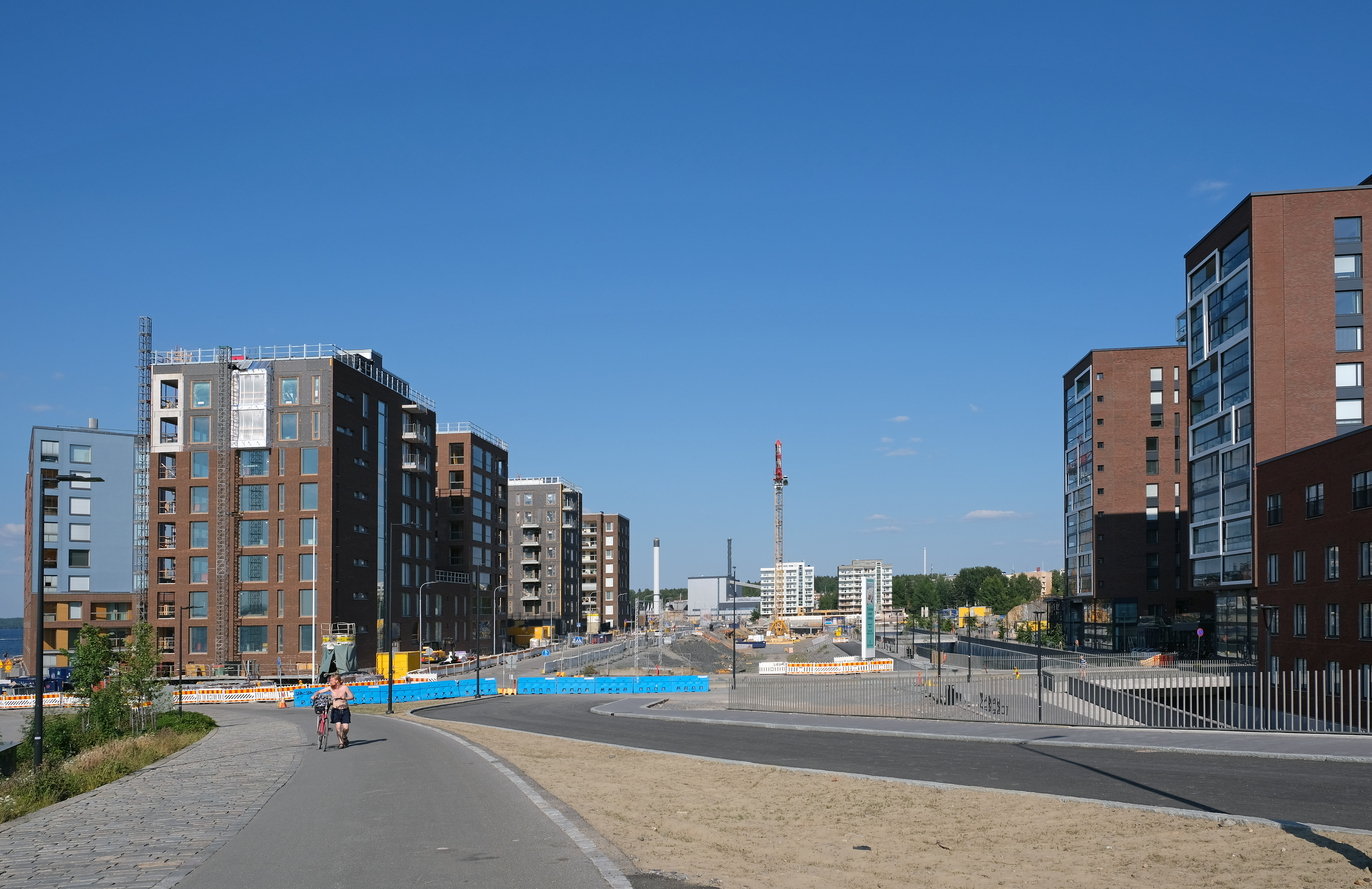 Ranta-Tampellan Katu ja sinne rakenteilla olevia kerrostaloja kesällä 2020.